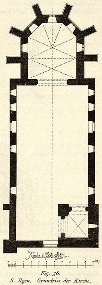 Grundriss der Kirche St. Ägidien in St. Ilgen (Sulzburg)